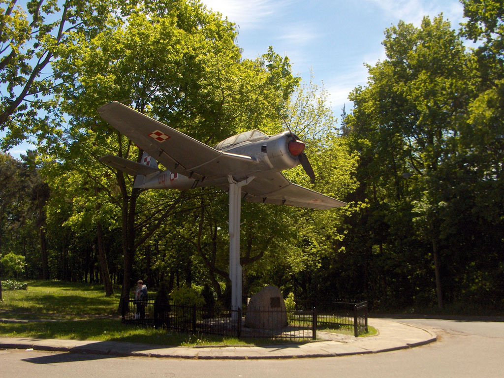 Gdynia Babie Doły. Napis na kamiennym pomniku brzmi: "Tym, co serce i młodość poświęcili lotnictwu i ojczyźnie, służąc na lotnisku Oksywie-Babie Doły. Koledzy." Kamień odsłonięty 9. maja 2004 roku.